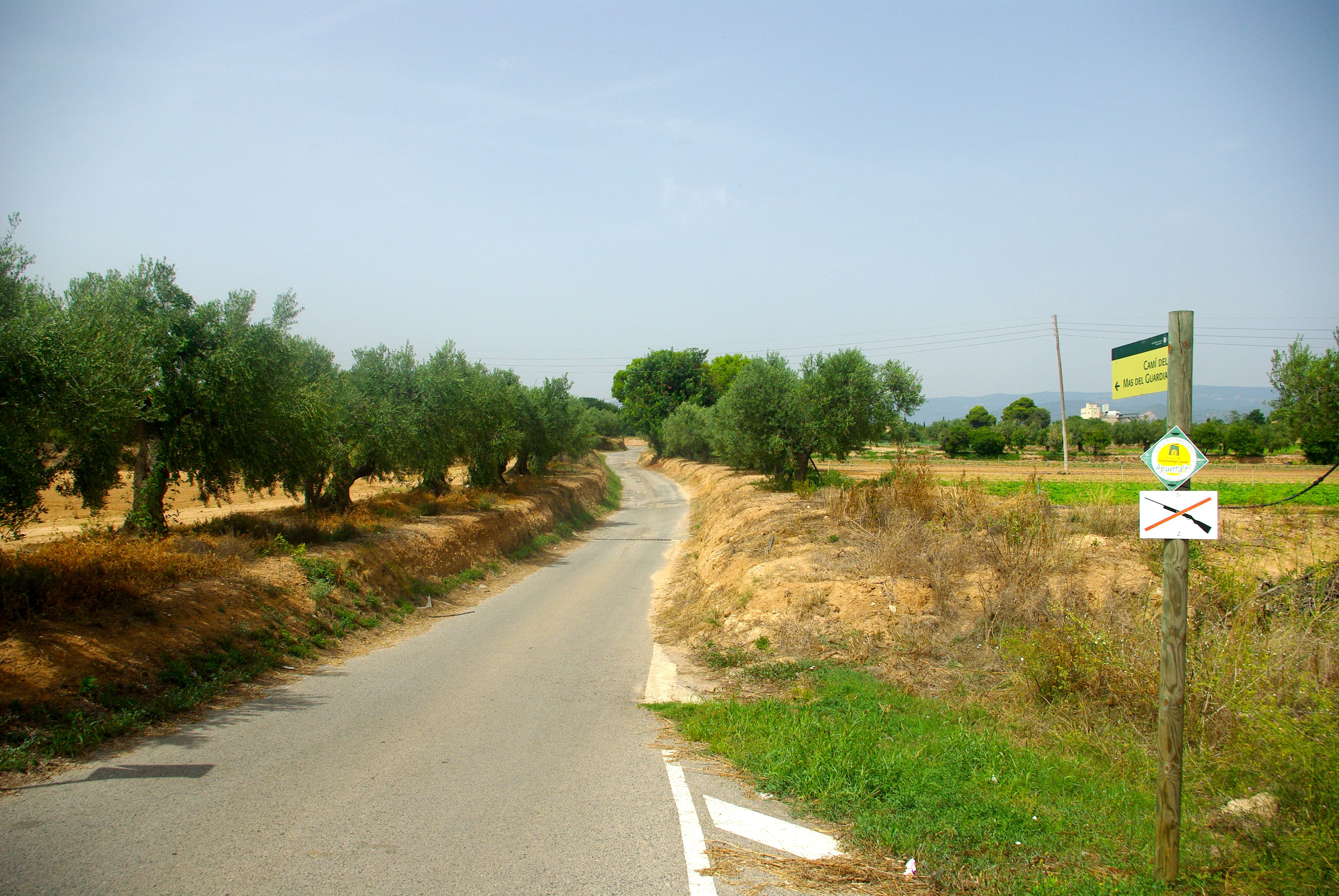 Camí del Mas de Guardià, al terme de Reus